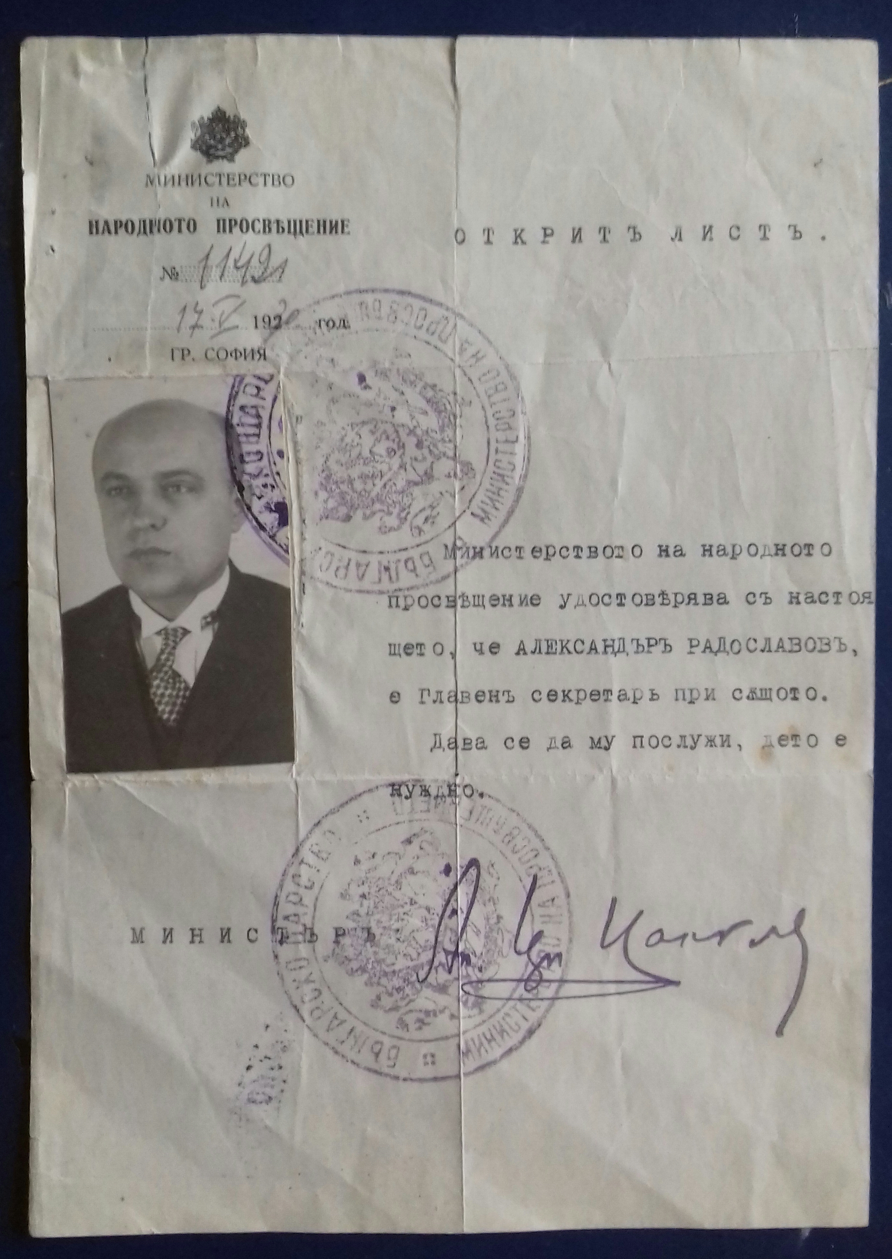 Открит лист на Александър Радославов с подписа на министър Александър Цанков